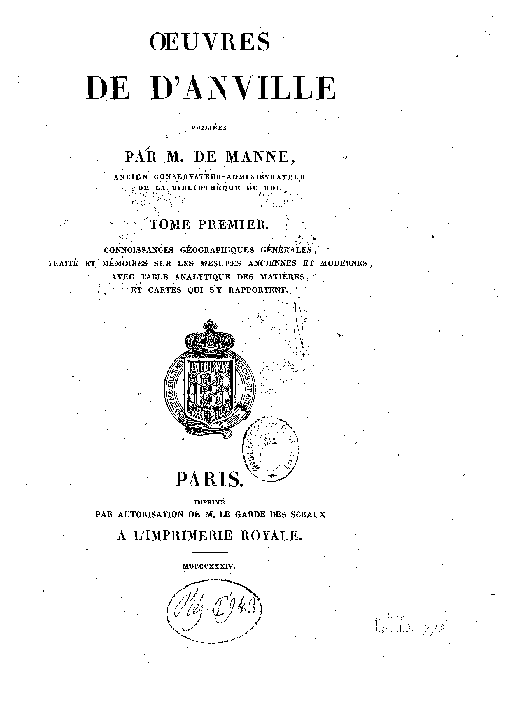 Couverture du livre de Louis-Charles de Manne dur d'Anville